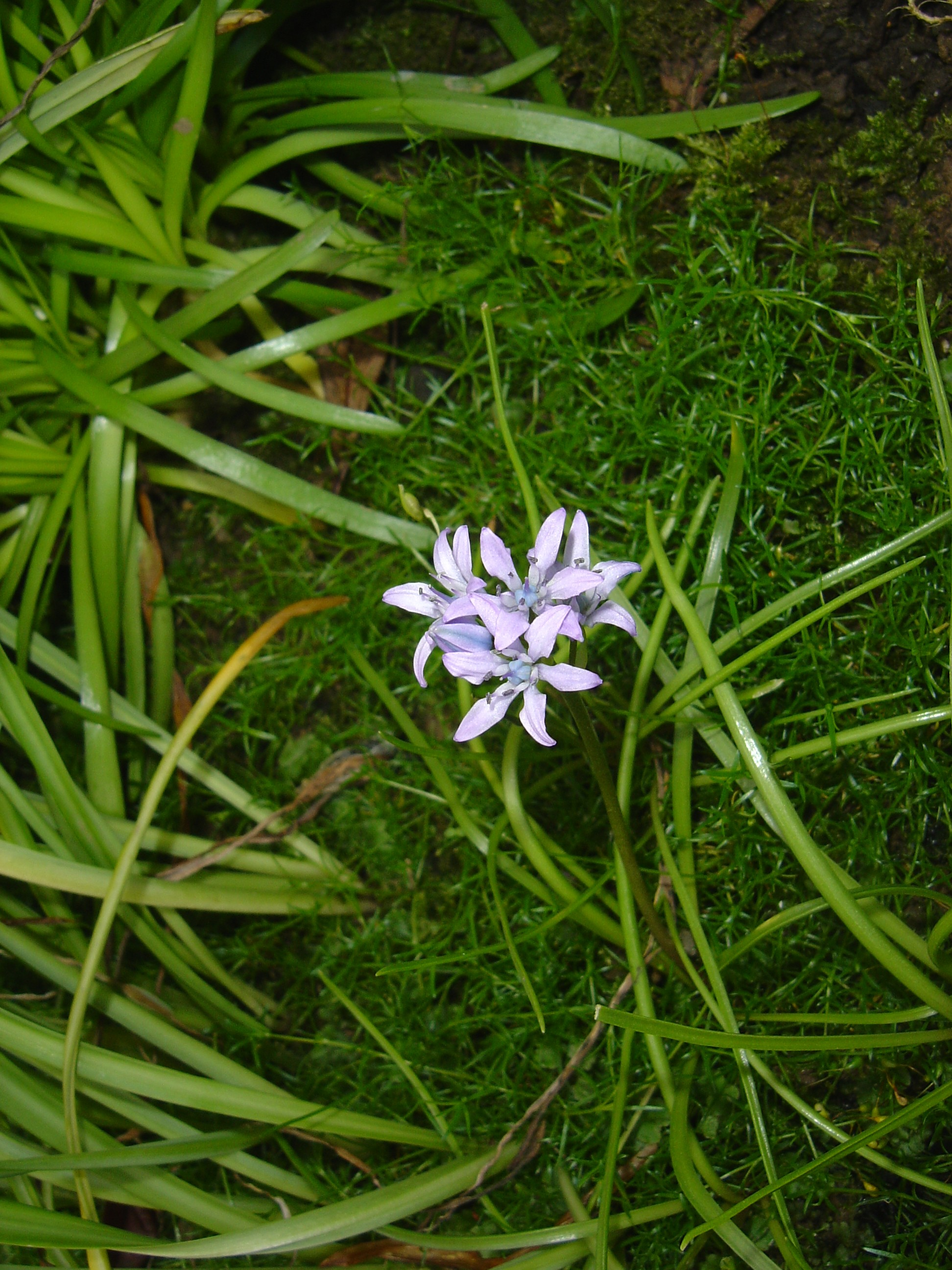 Scilla verna en culture, photographié dans mon jardin